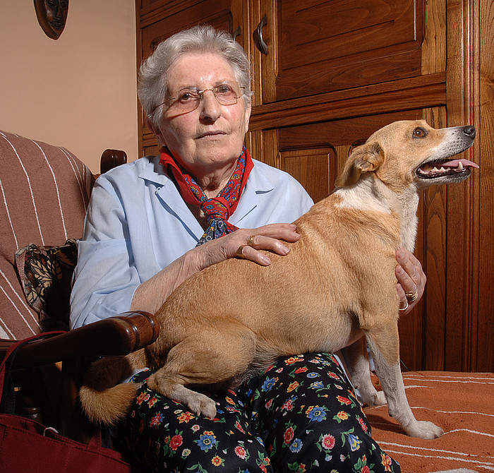 MariJane Minaberri 2007an, Ustaritzeko bere etxean. Gaizka Irozen argazkia da.